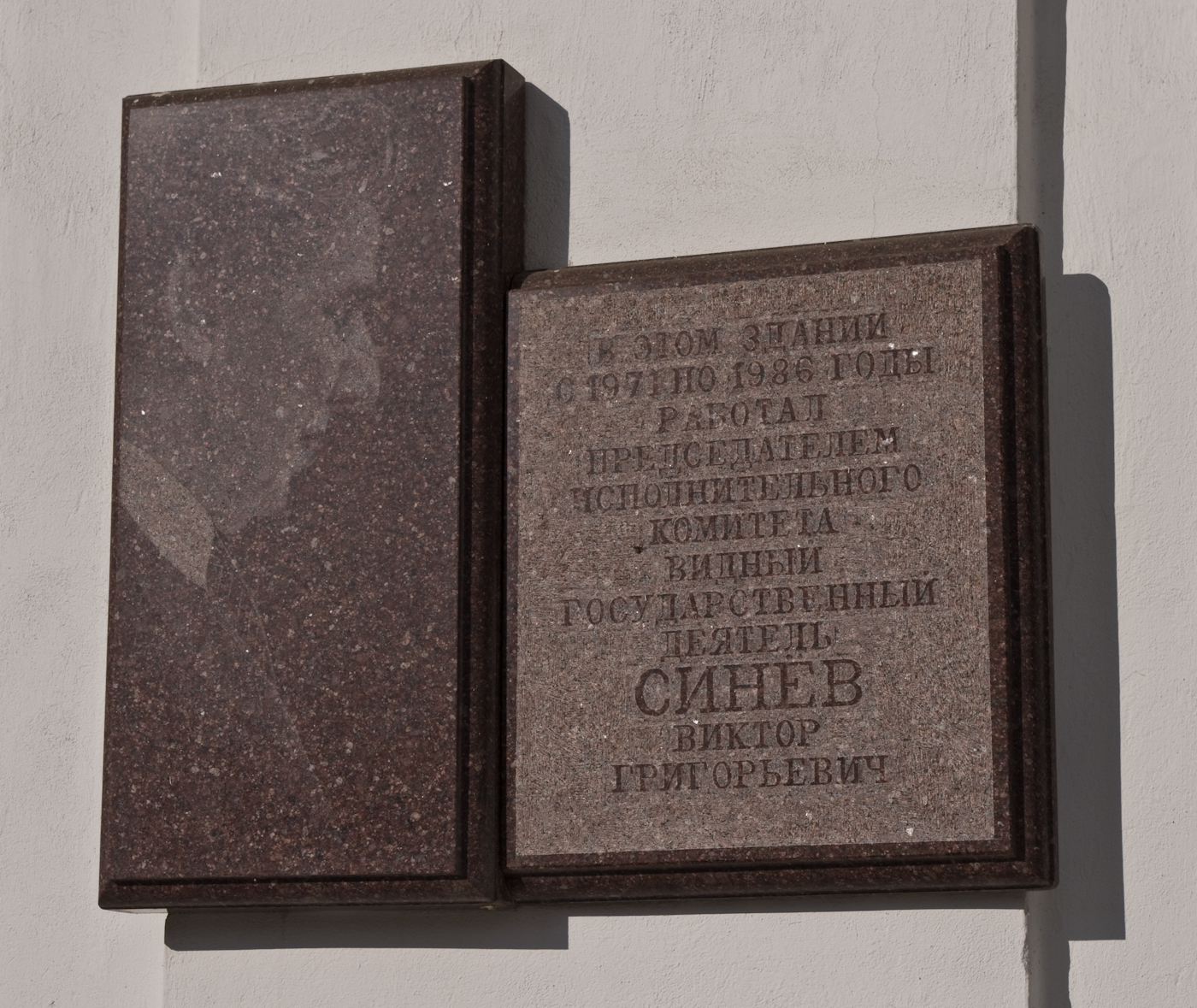 Память о Синеве увековечена на здании Верховного Совета